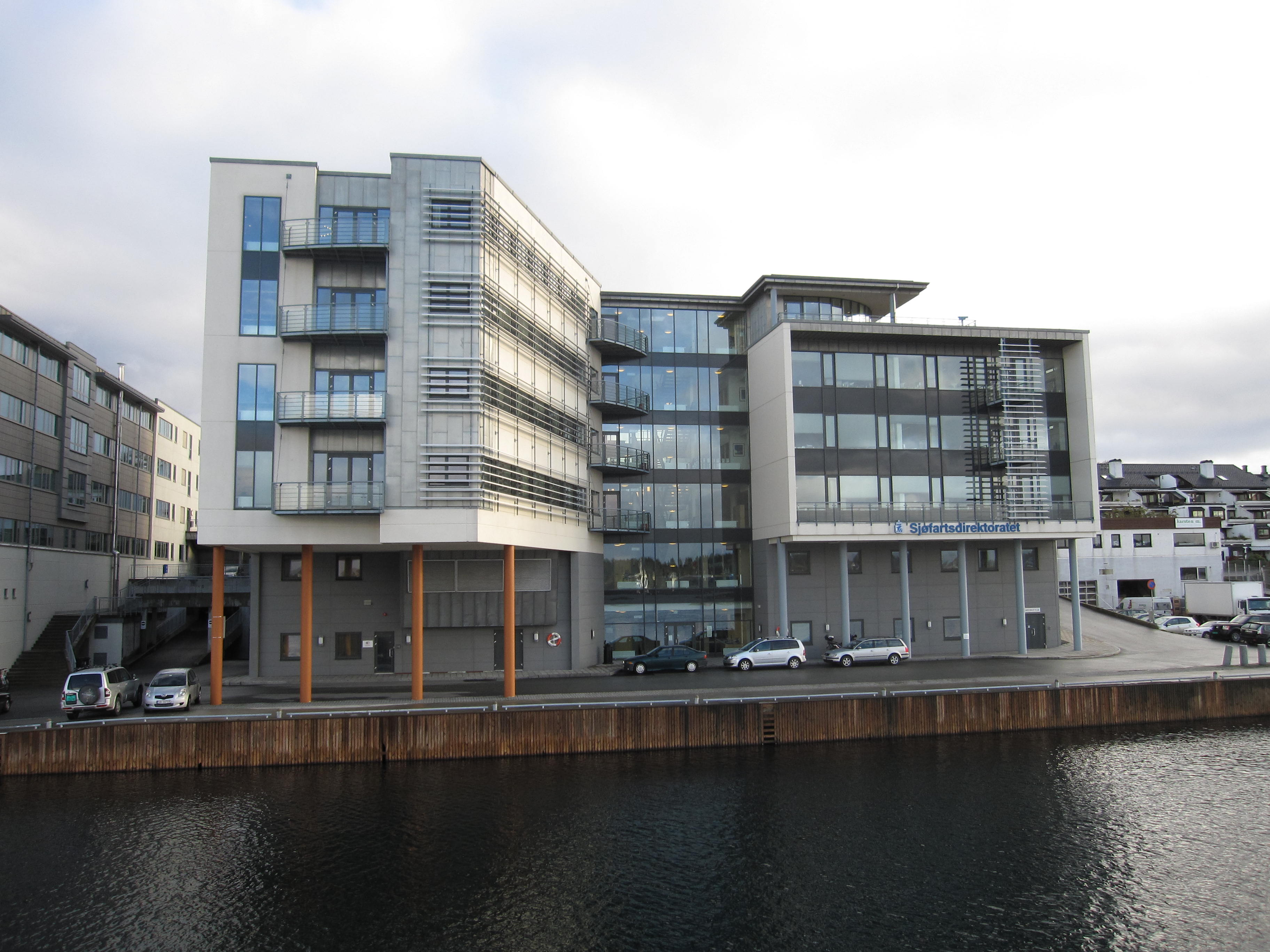 Norwegian Maritime Directorate, Head quarter October 2010.